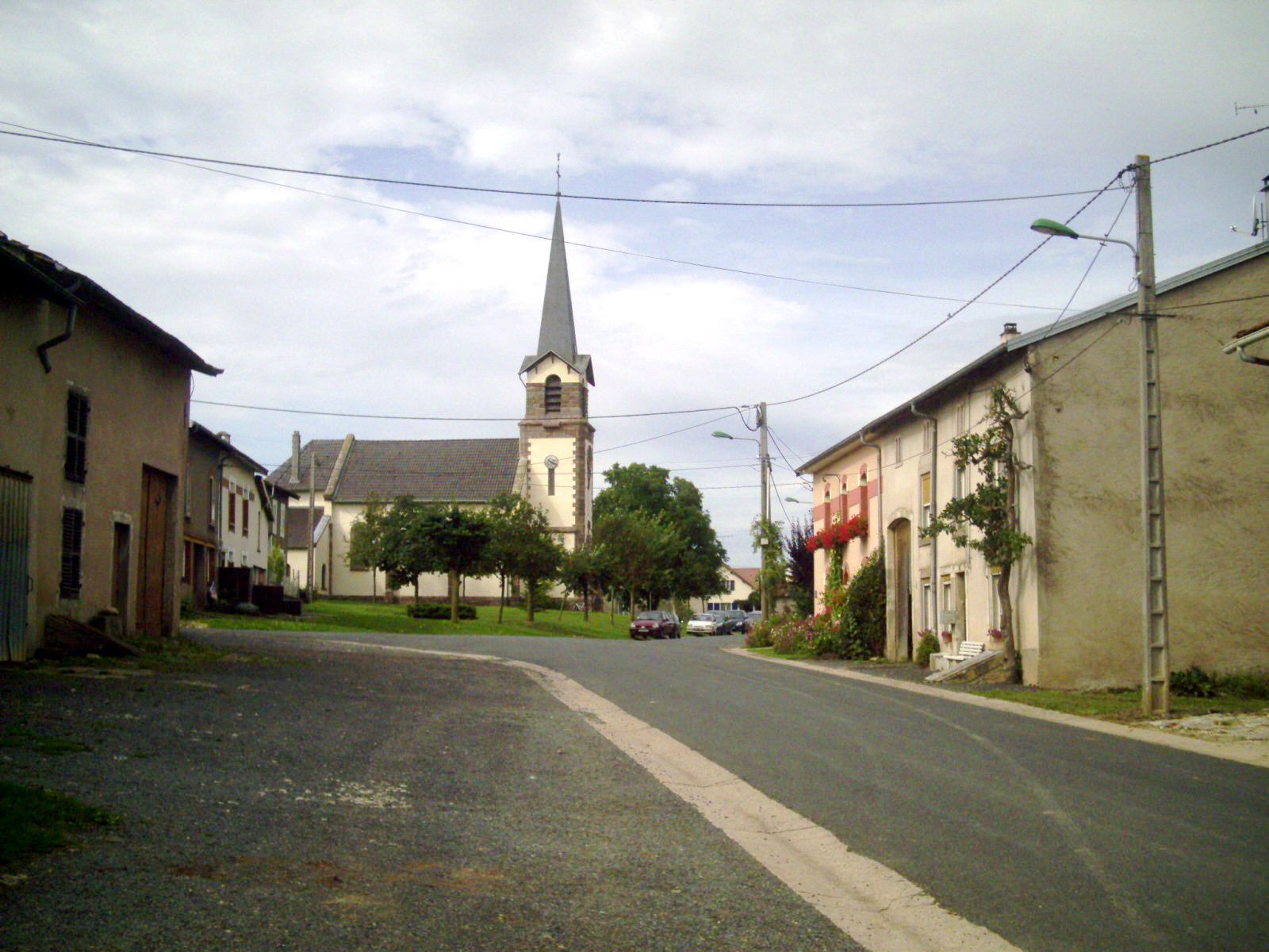 Réchicourt-la-Petite : église